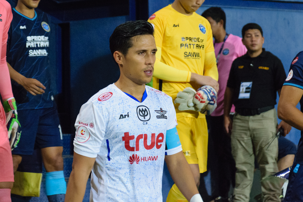 Anthony Ampaipitakwong